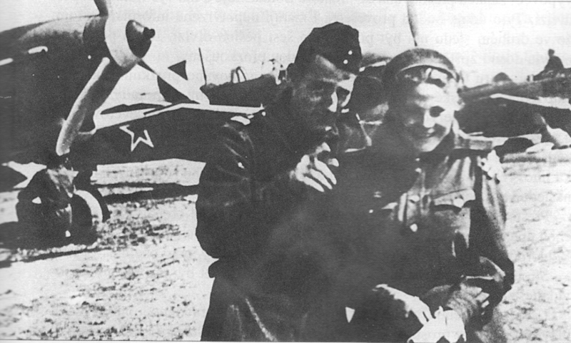 Eskadra Normandie-Němen náležející ke Svobodným Francouzům. Poručík Bruno de Faletans s radistkou